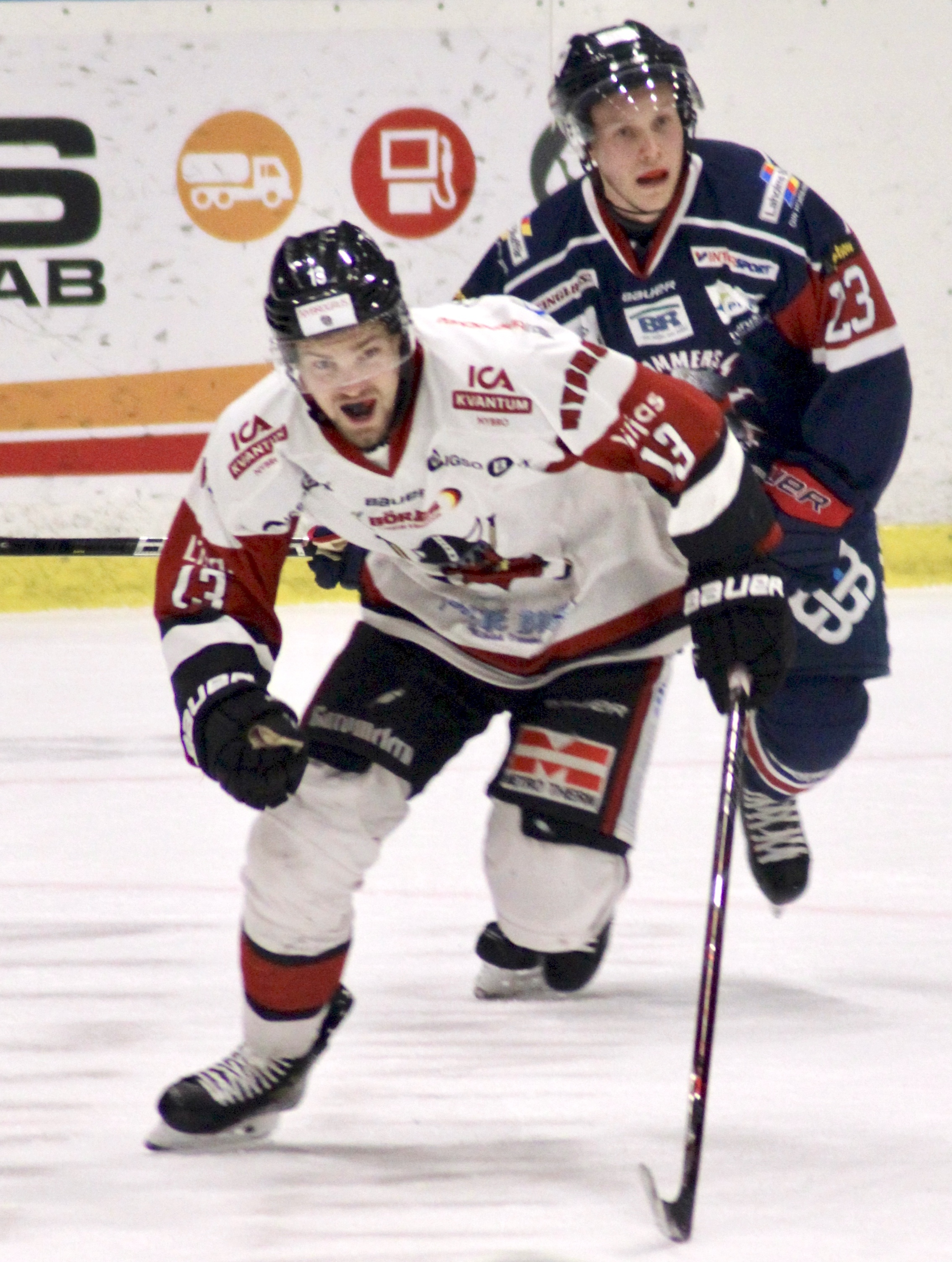 Patrik Fransson (Nybro) och Robin Holm (Halmstad) under en match i Halmstad Arena 2018-10-12.